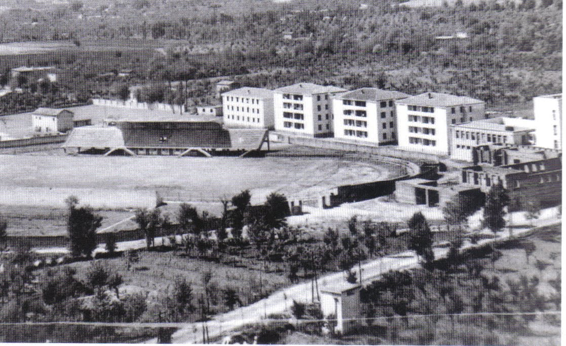 Frosinone: lo stadio comunale e il teatro incompiuto che, danneggiato dai bombardamenti, verrà poi demolito.